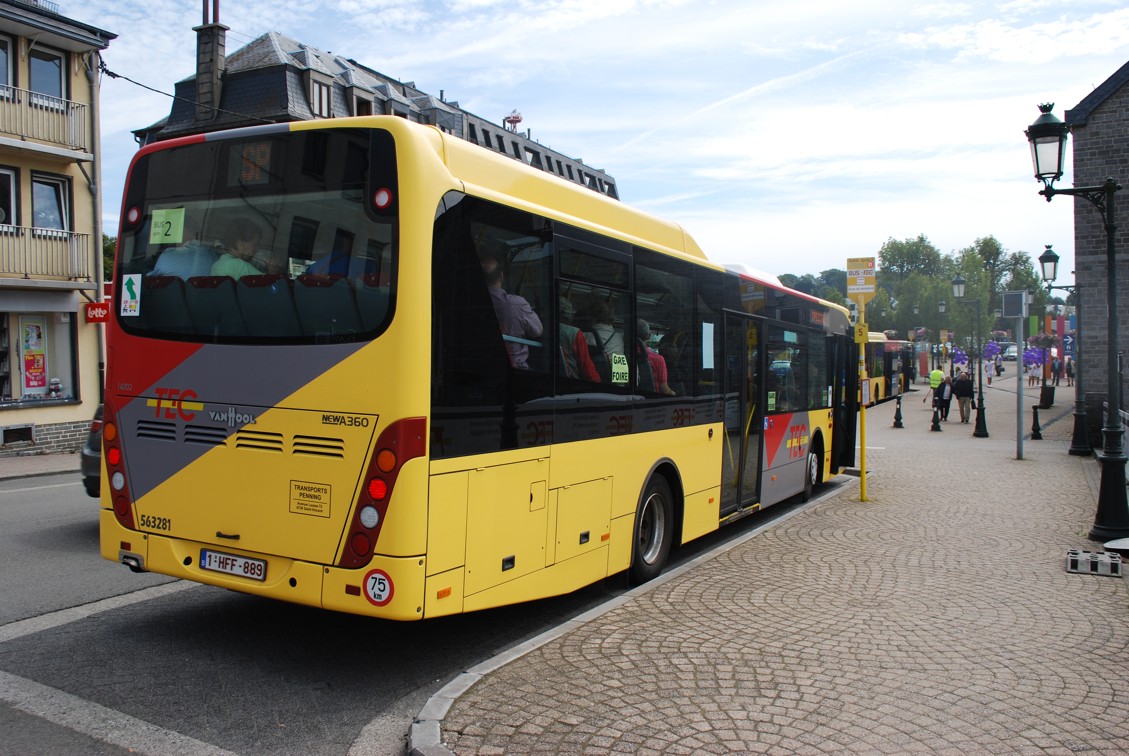 Vue de Libramont.